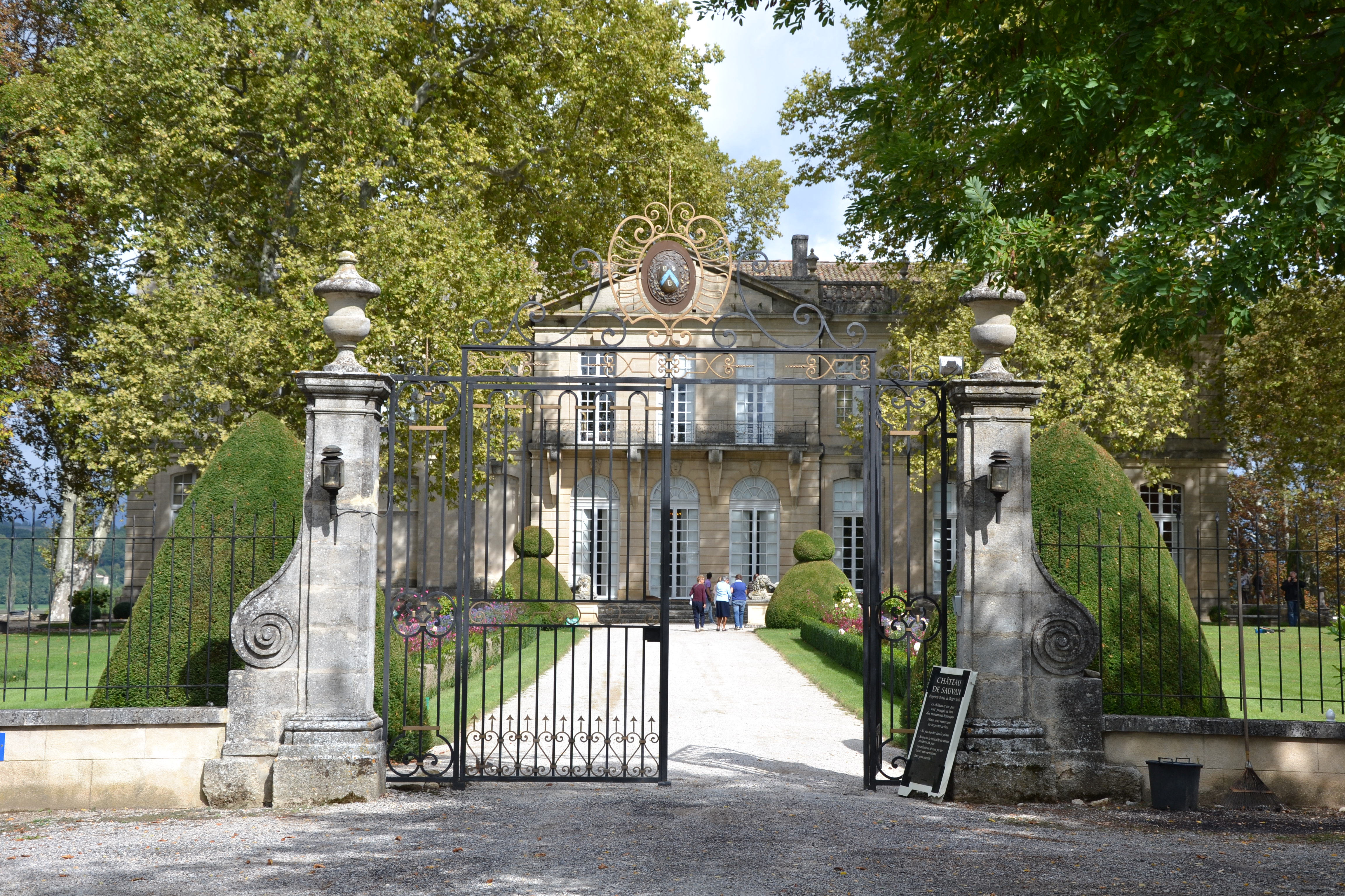 Château de Sauvan (ClasséInscrit) .